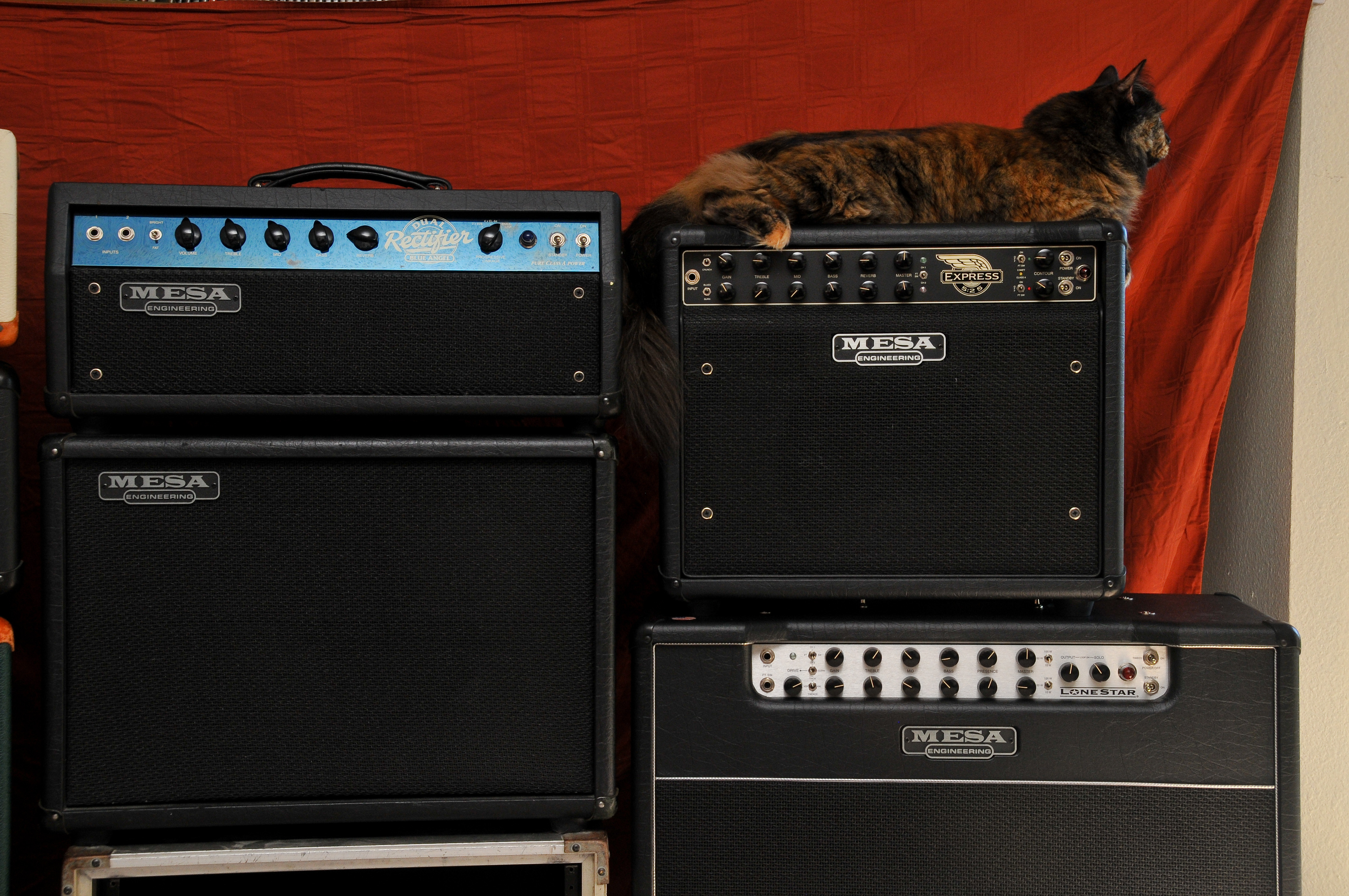 MesaBoogie Blue Angel, Express 525, Lone Star (and Ginger)